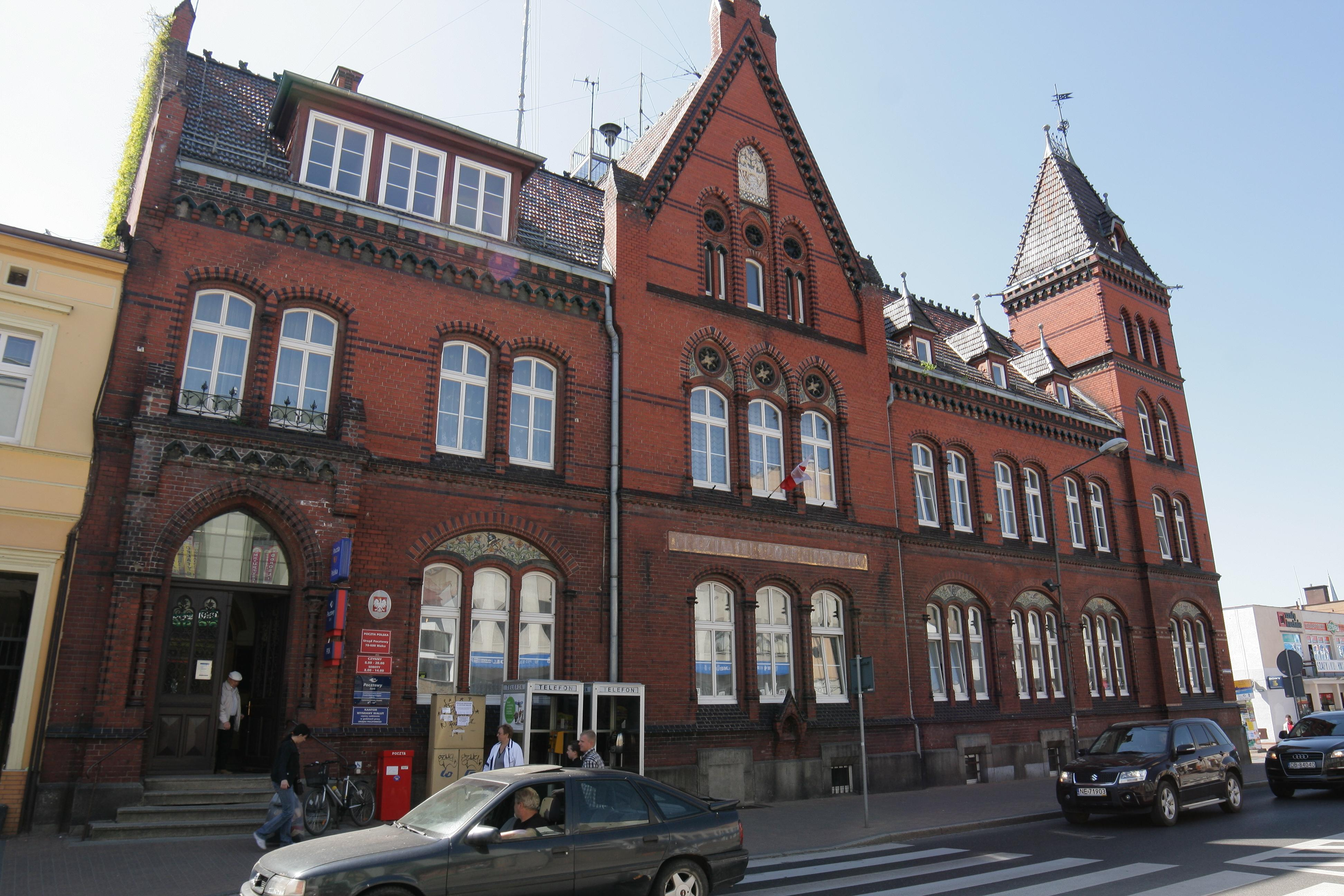 Wałcz